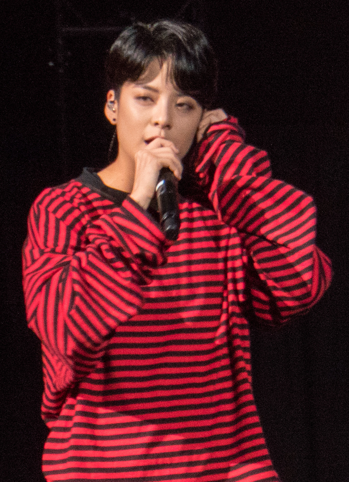 Amber live at KCON16 LA